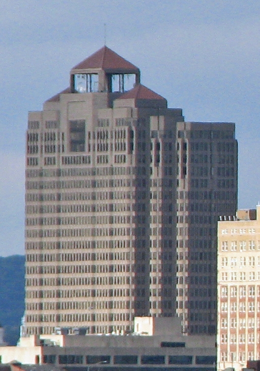 Connecticut Financial Center